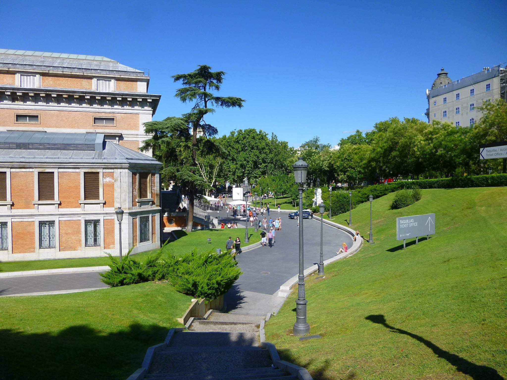 Madrid - Museo del Prado.